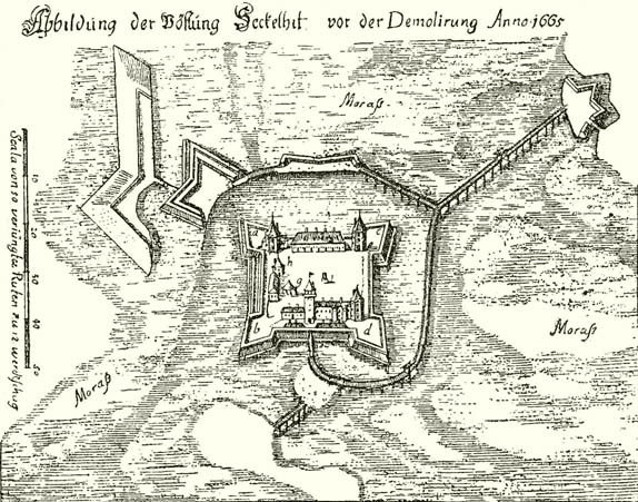 Székelyhíd vára 1665 (metszet).